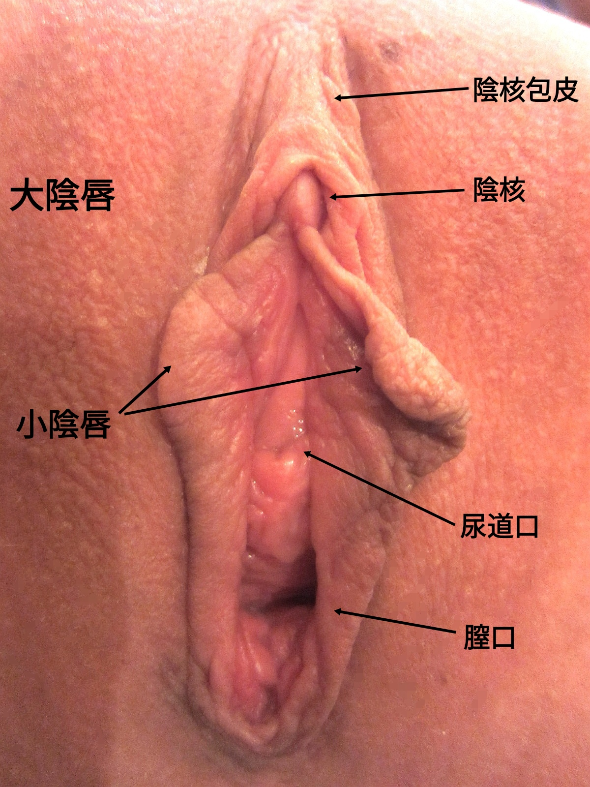 性熟した女性器の外観